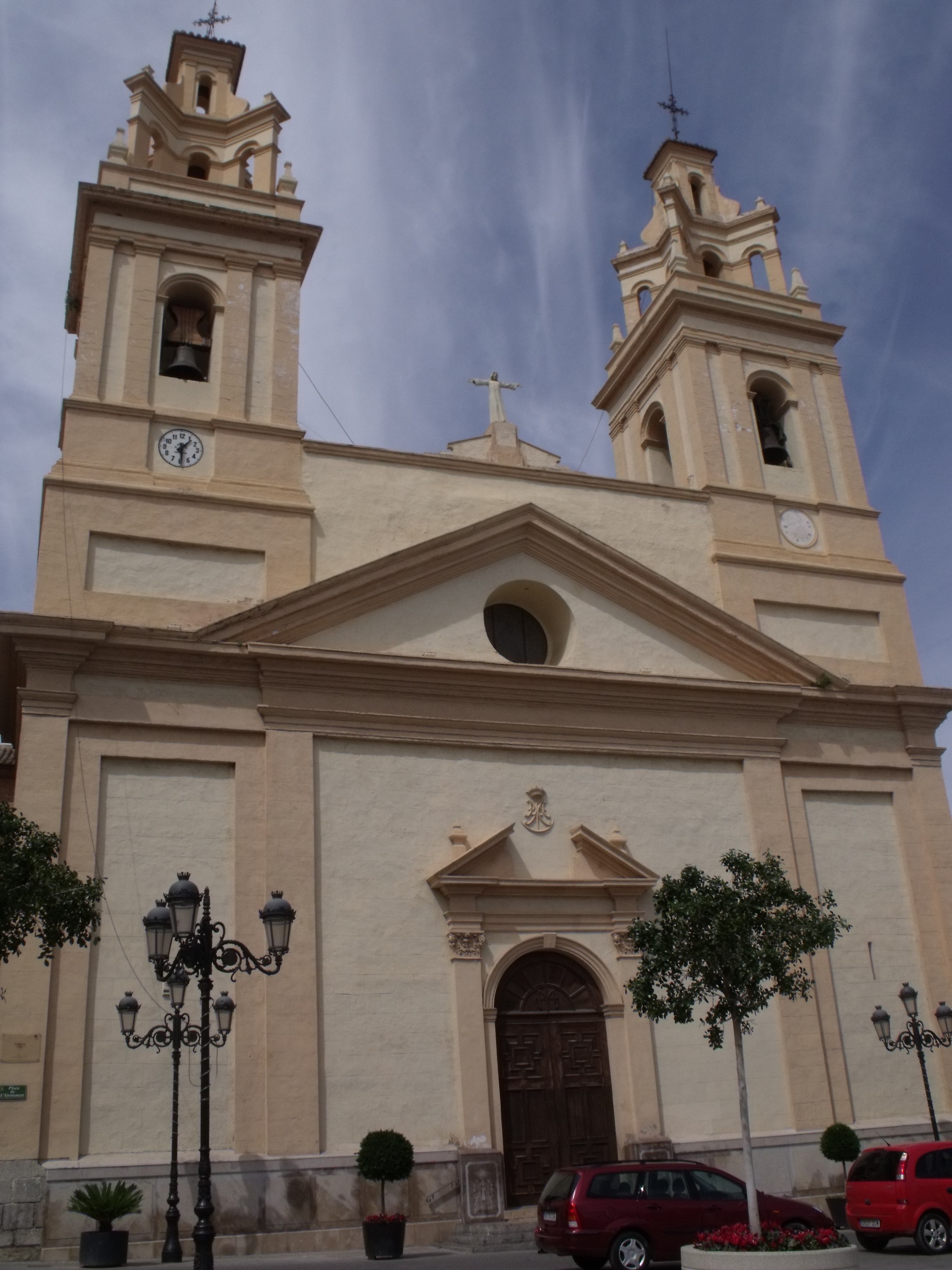 Plaza del Ayuntamiento de Ribarroja del Turia. Iglesia Parroquial de la Asunción.